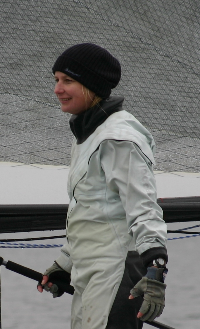 Nicola Birkner